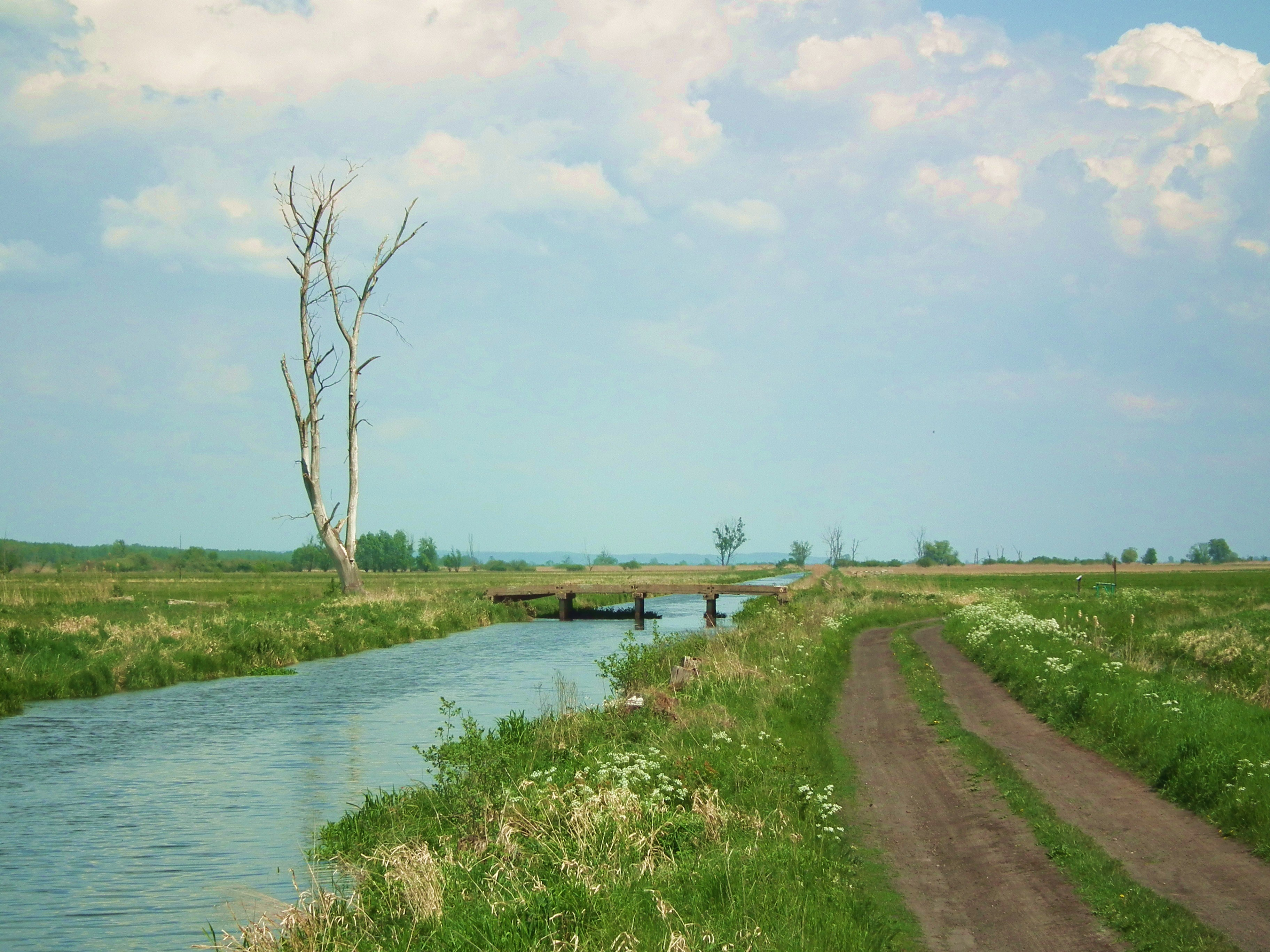 Park Narodowy Ujście Warty, polder płn. Rejon Starej Warty.